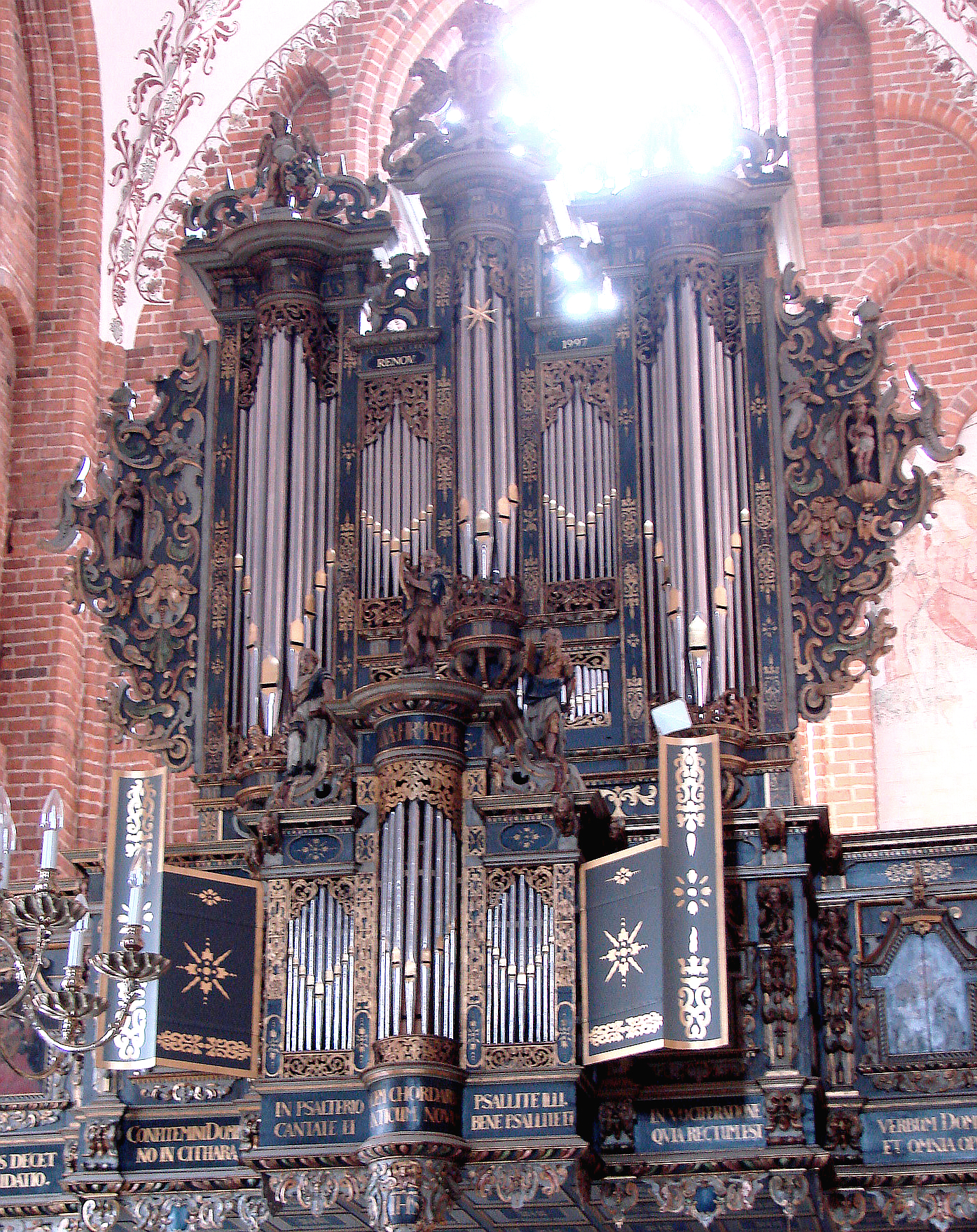 Orglet - Orgelfacaden er fra Johan Lorentz' orgel fra 1634-1636. Det nuværende orgelværk er fra 1960, bygget af Frobenius.